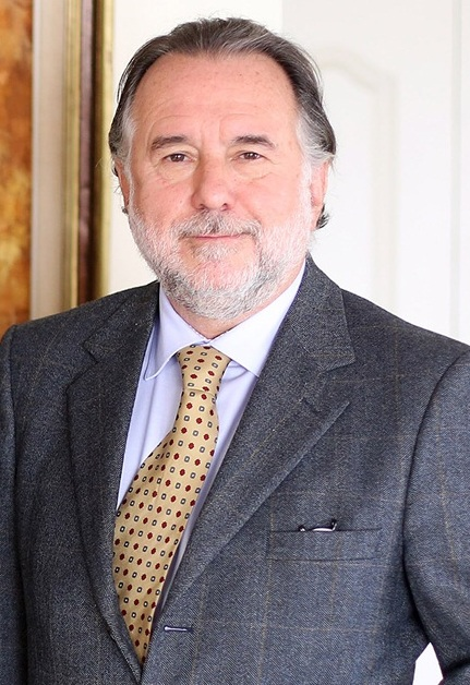 Ministro de Defensa Recibe a Mariano Fernández, embajador de Chile en Alemania.